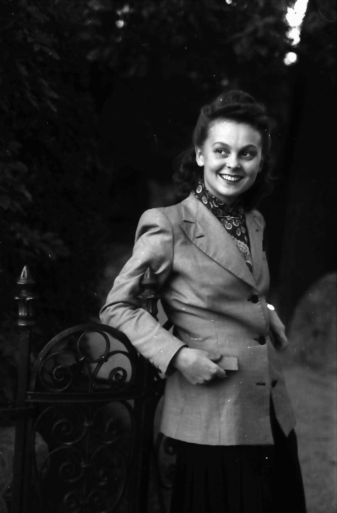 Bukarest: UFA-Truppe, Bruni Löbel, Porträt